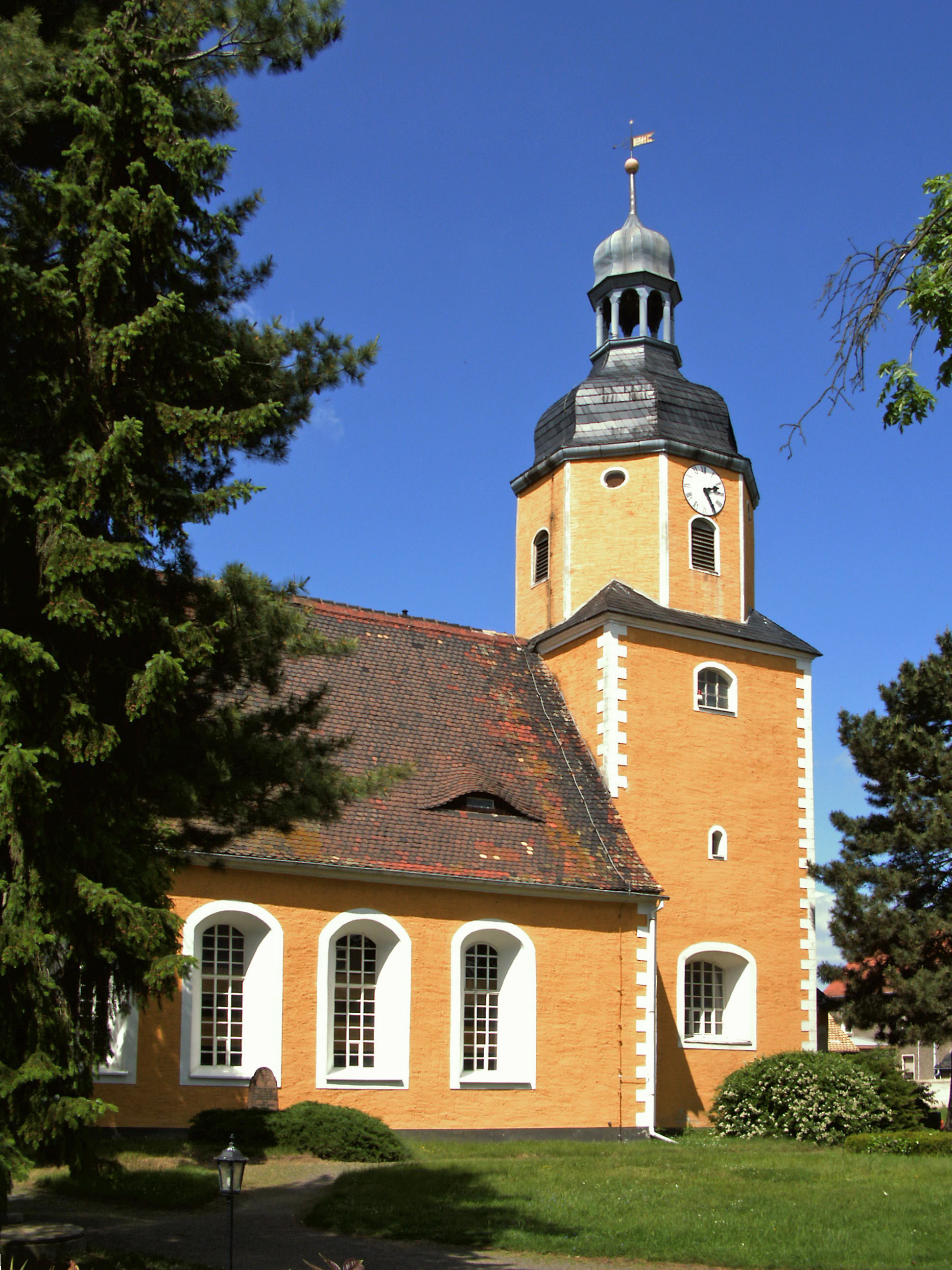 Evangelische Kirche in Sachsendorf bei Wurzen